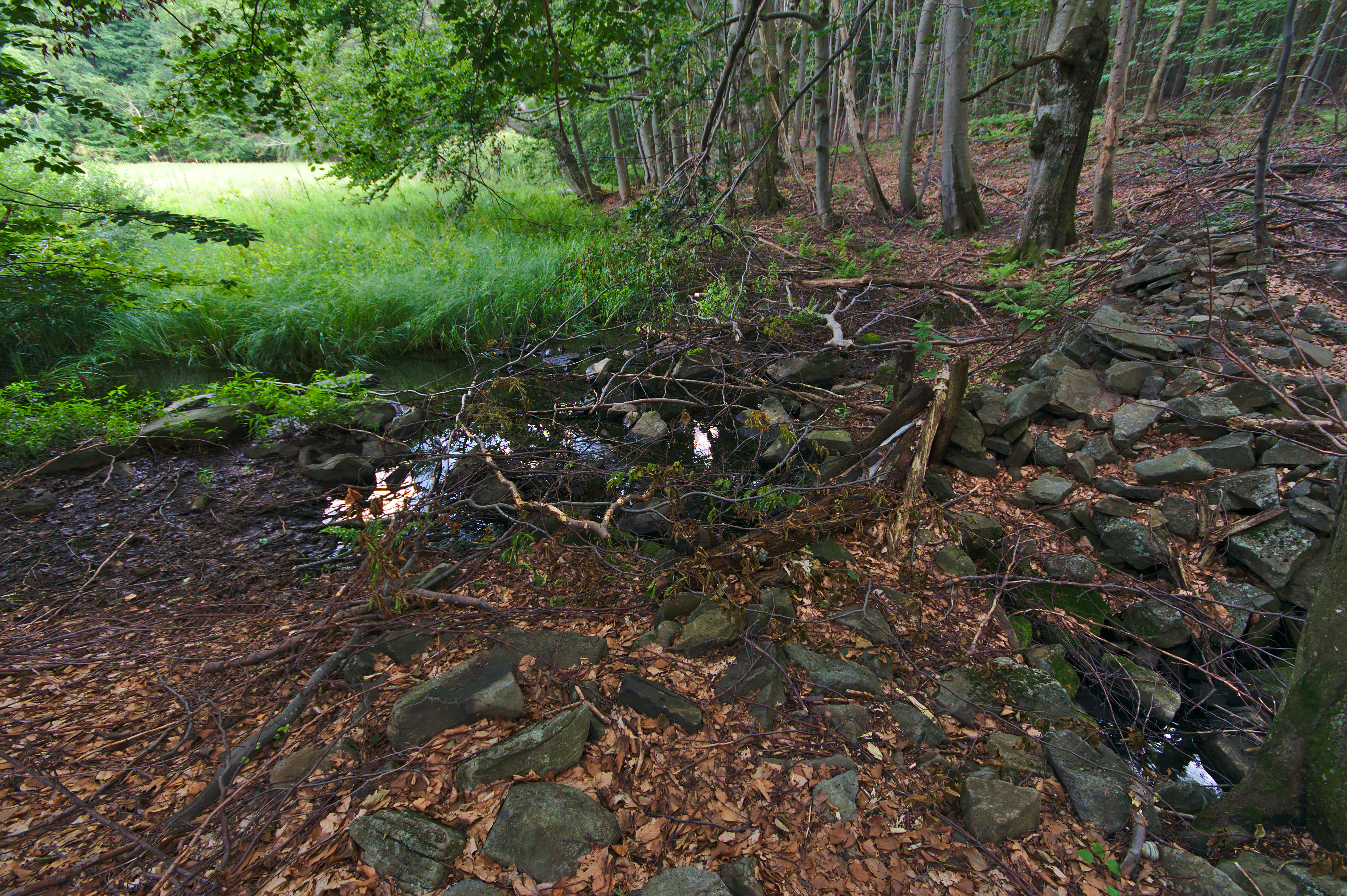 Národná prírodná rezervácia Motrogon - rašelinisko Hypkaňa, CHKO Vihorlat